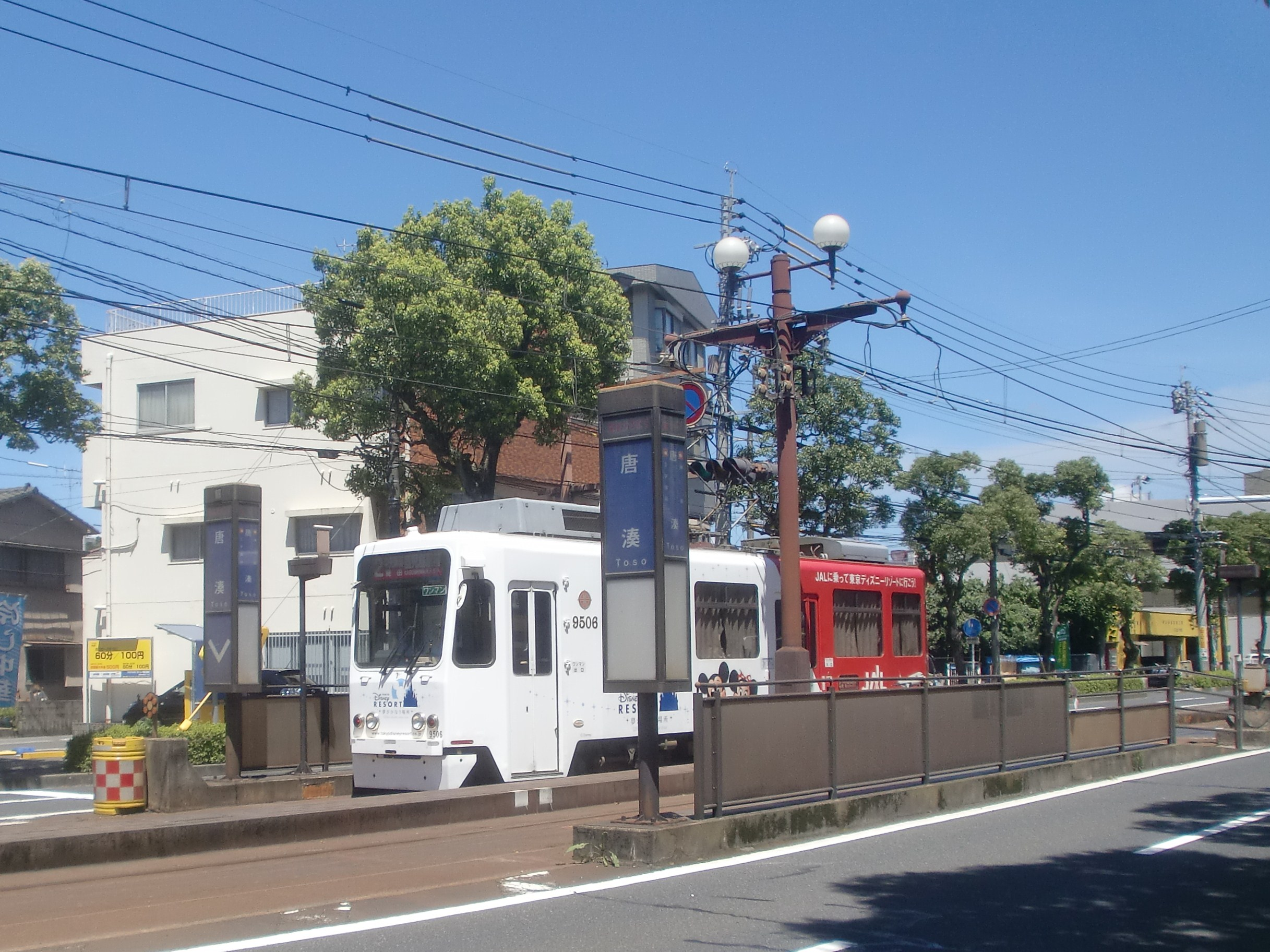 唐湊駅の外観。